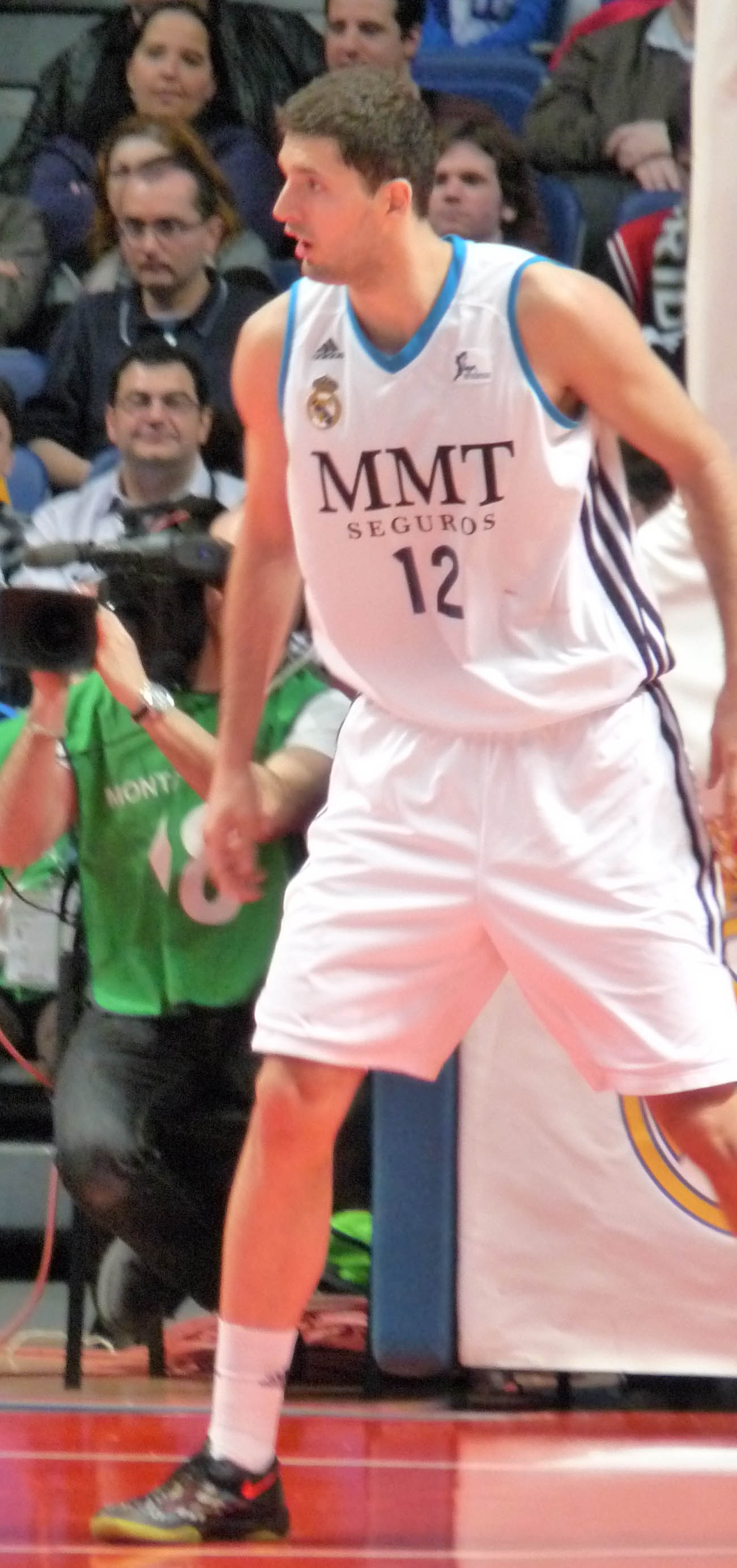 Nikola Mirotic